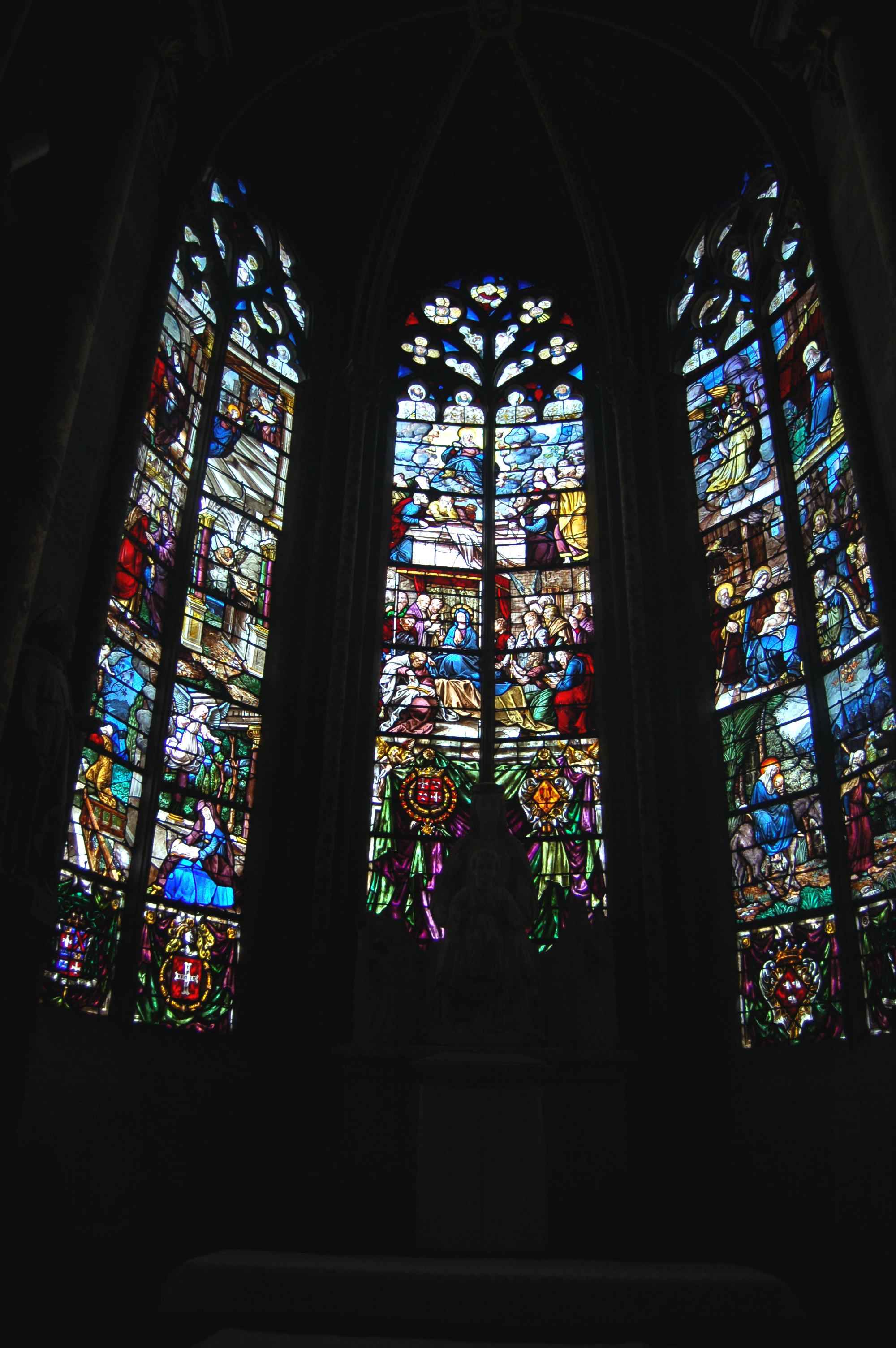 Vitrail dans la Cathédrale Saint-Étienne de Bourges